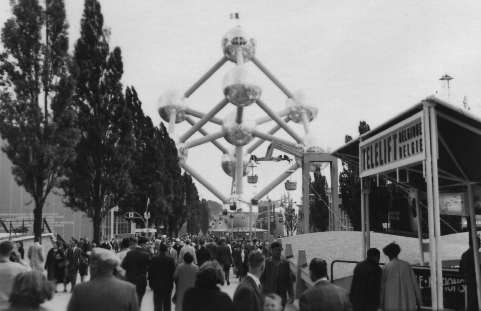 Weltausstellung 1958 in Brüssel, Blick aufs Atomium